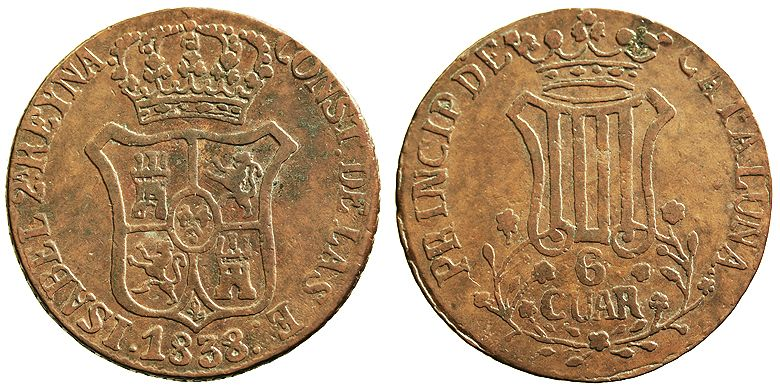 Moneda de sis quarts encunyada a Barcelona el 1838, regnant Isabel II. Feta en coure.